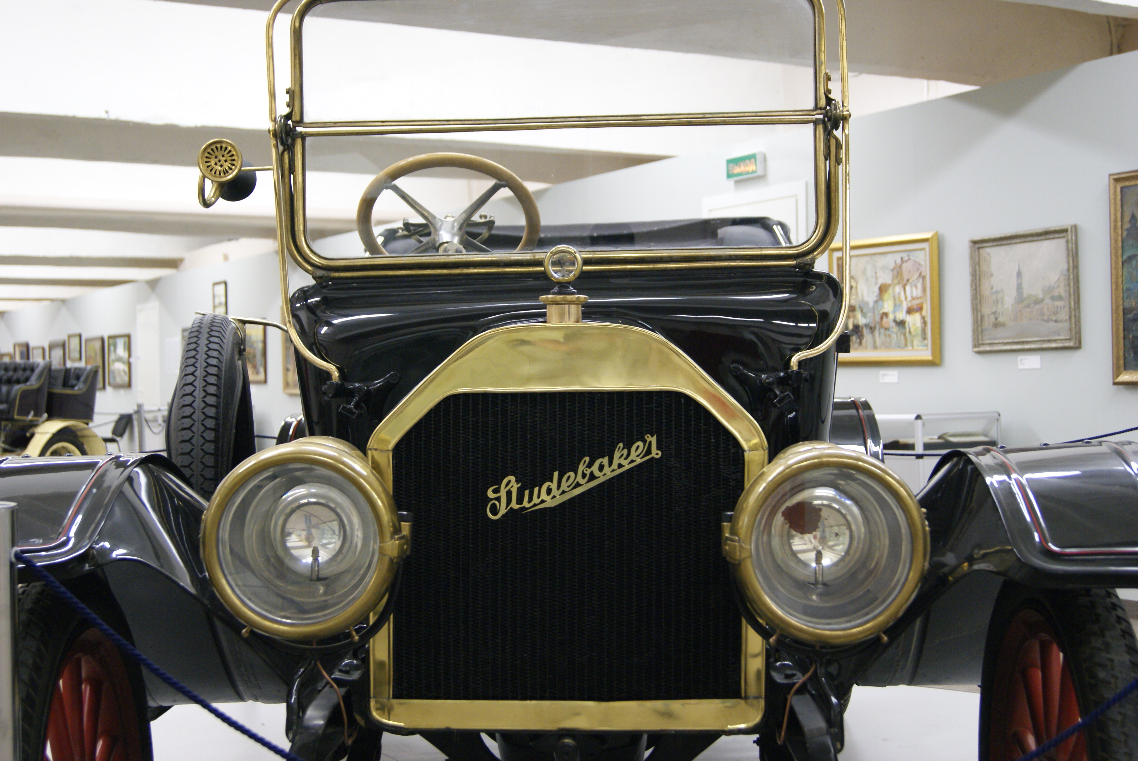 Studebaker Garford 1908